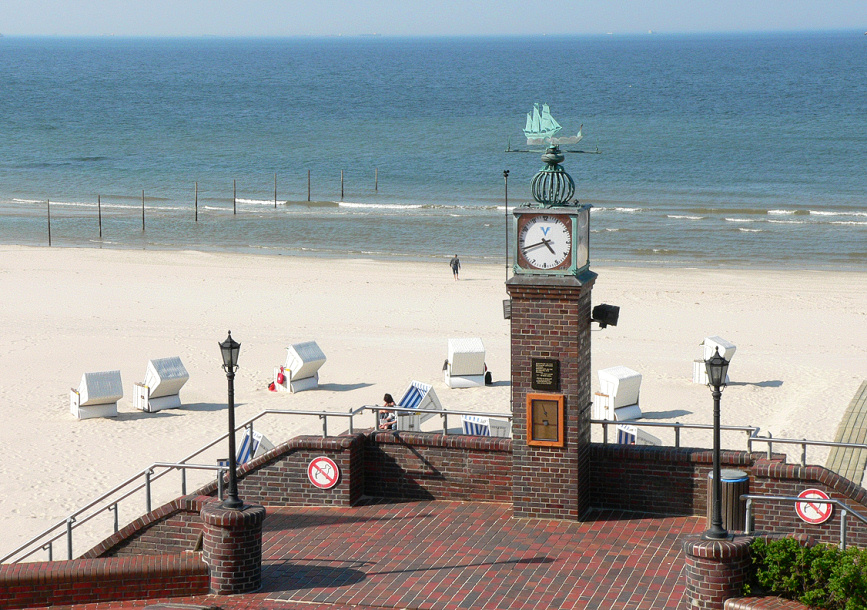 Blick vom Cafe Pudding auf den Strand von Wangerooge